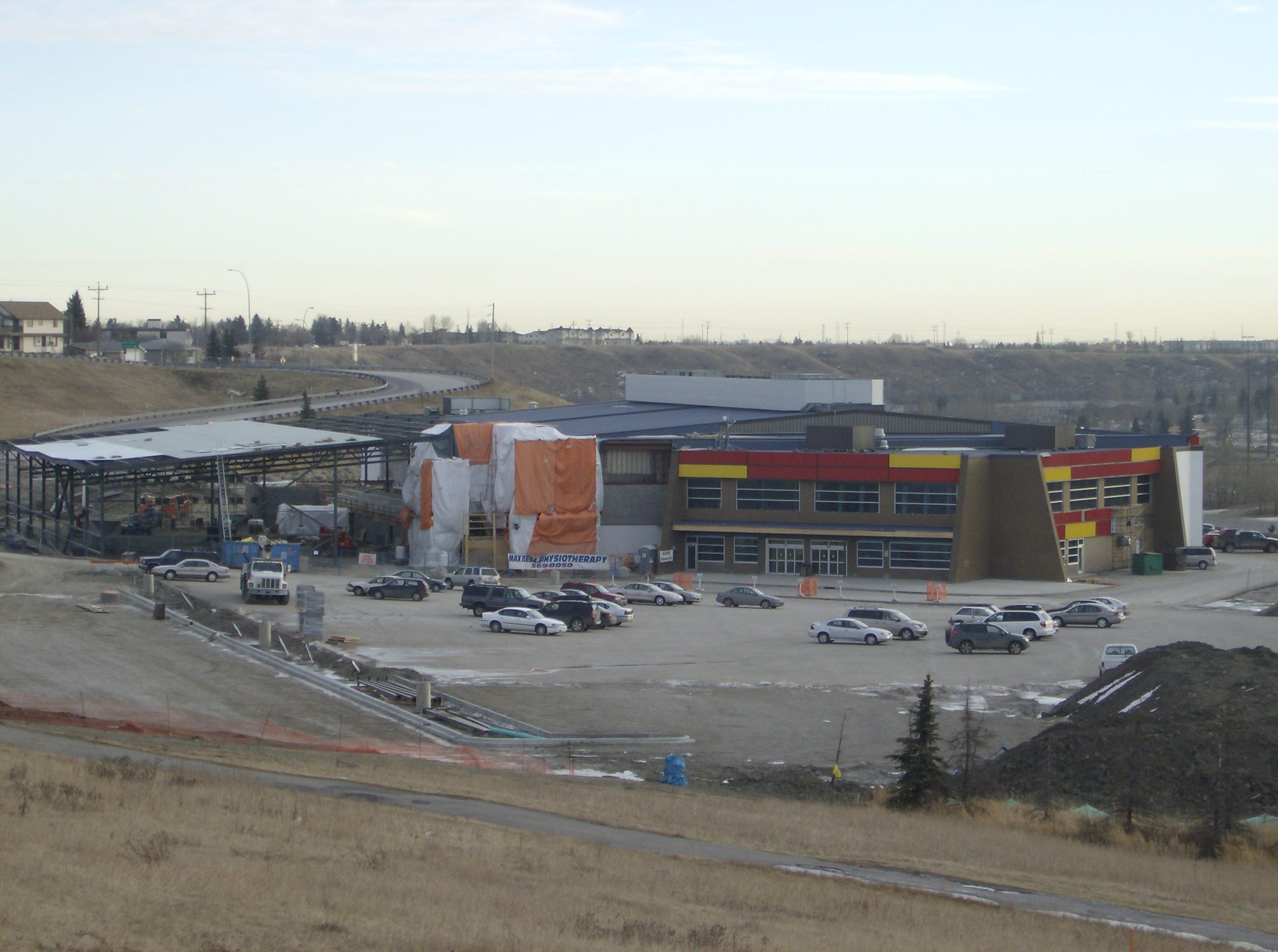 Max Bell Centre in Calgary, Alberta, Canada.